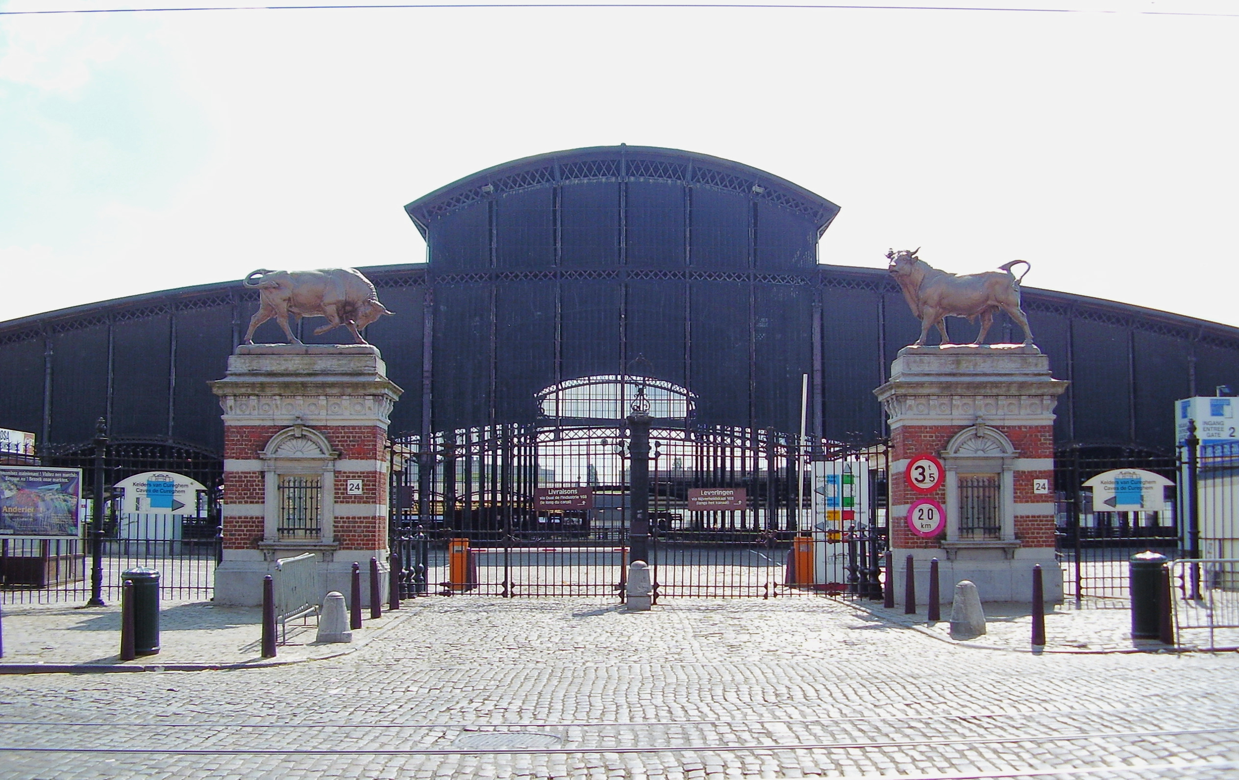 Abattoirs de Cureghem à Anderlecht - 1890 (Bruxelles) - Copie des deux taureaux du sculpteur français Isidore Bonheur (1827-1901) - modéles exposés à l'Exposition universelle de 1878, Paris - Originaux à l'entrée du Parc Georges Brassens à Paris.